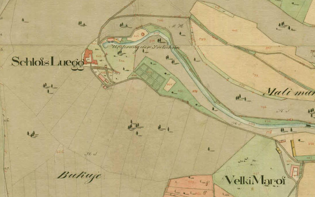 Franciscejski kataster za Kranjsko, 1823-1869